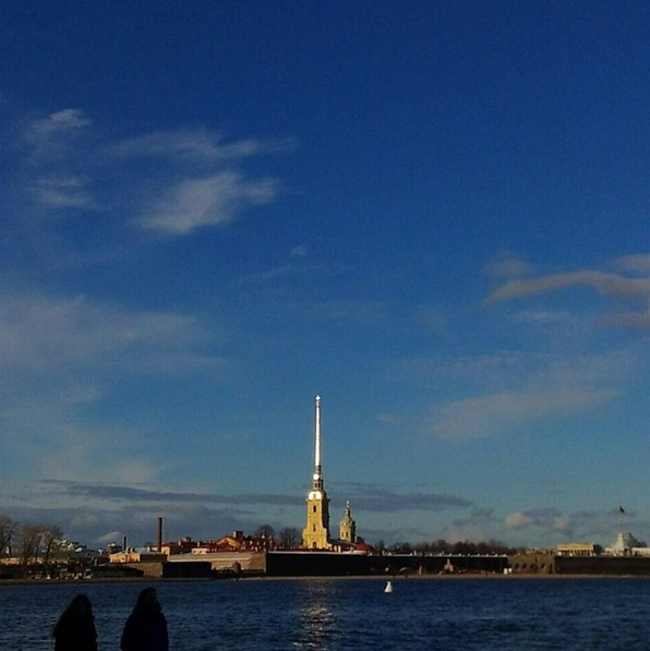 Peter and Paul Fortress. View across the Neva River